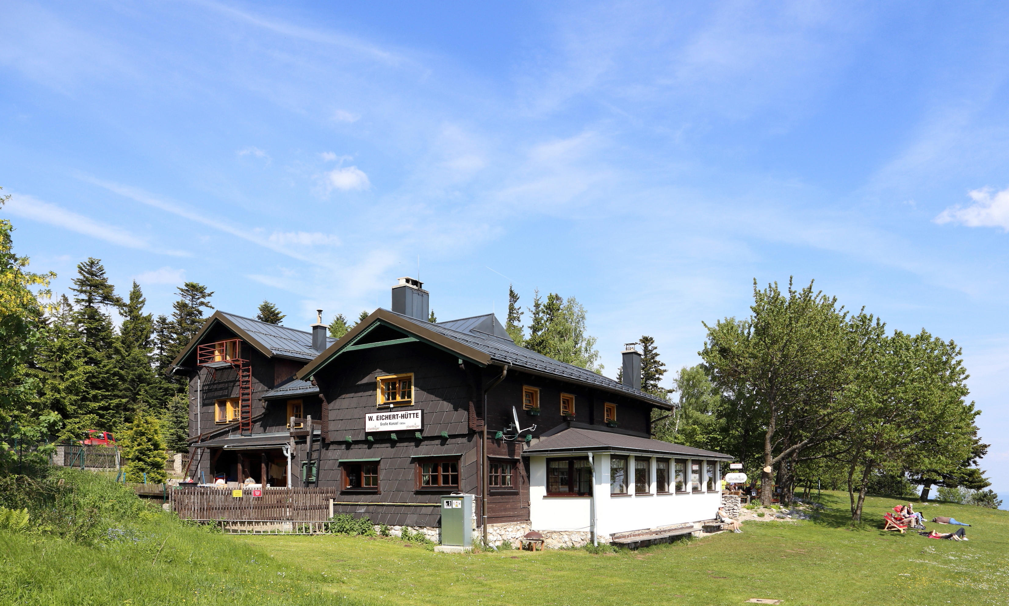 Das Wirtshaus und Schutzhaus Wilhelm-Eichert-Hütte auf der Hohen Wand in der niederösterreichischen Gemeinde Höflein an der Hohen Wand. Die Hütte wurde von der Sektion Wiener Neustadt des Österreichischen Touristenklubs nächst der Großen Kanzel errichtet und 1899 eröffnet. Benannt ist sie nach dem Professor Wilhelm Eichert, der von 1884/5 bis 1902 Erster Vorsitzender der ÖTK-Sektion Wiener Neustadt und Autor von vielen Wanderführern war.